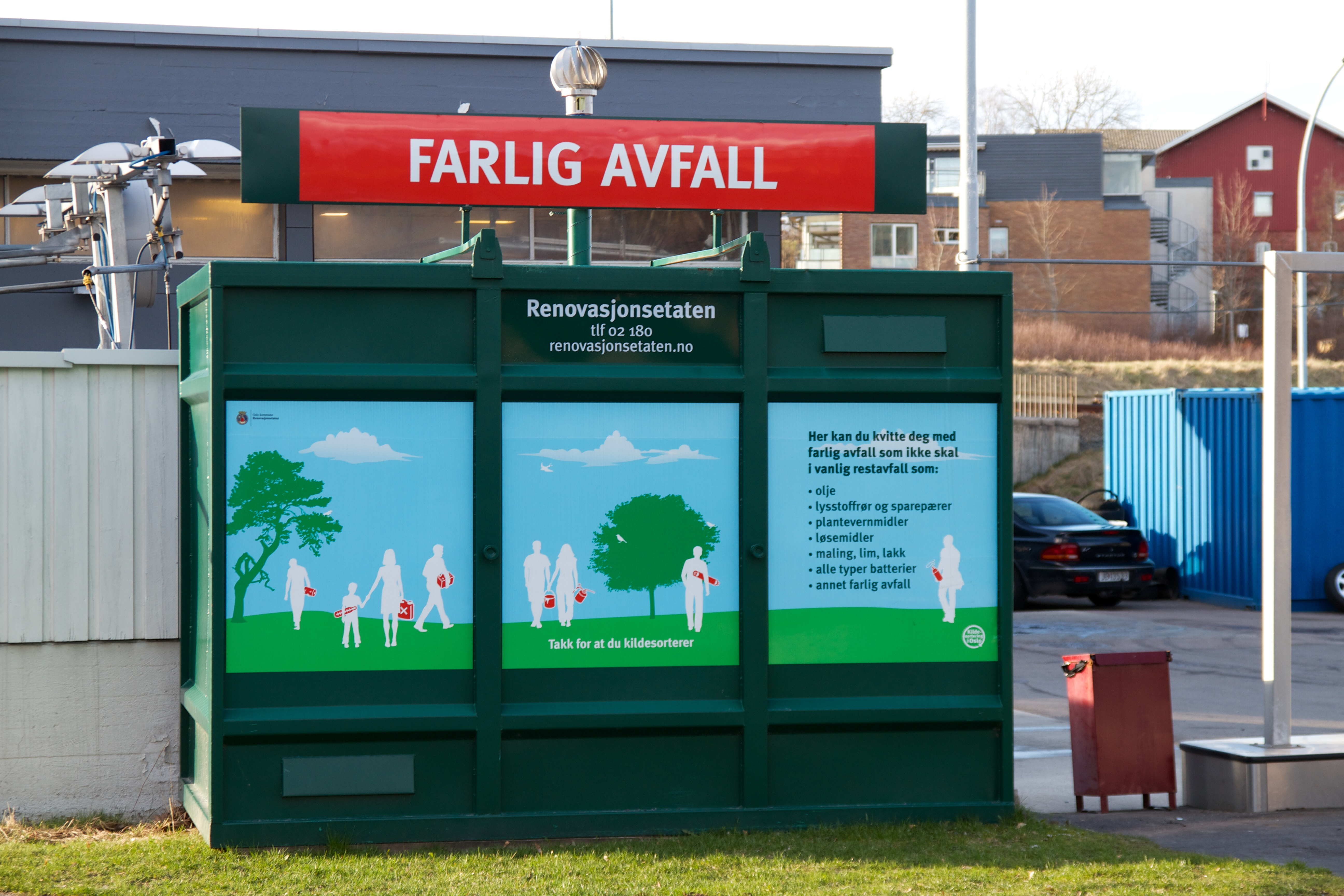 Miljøstasjon for farlig avfall - Bøler i Oslo.